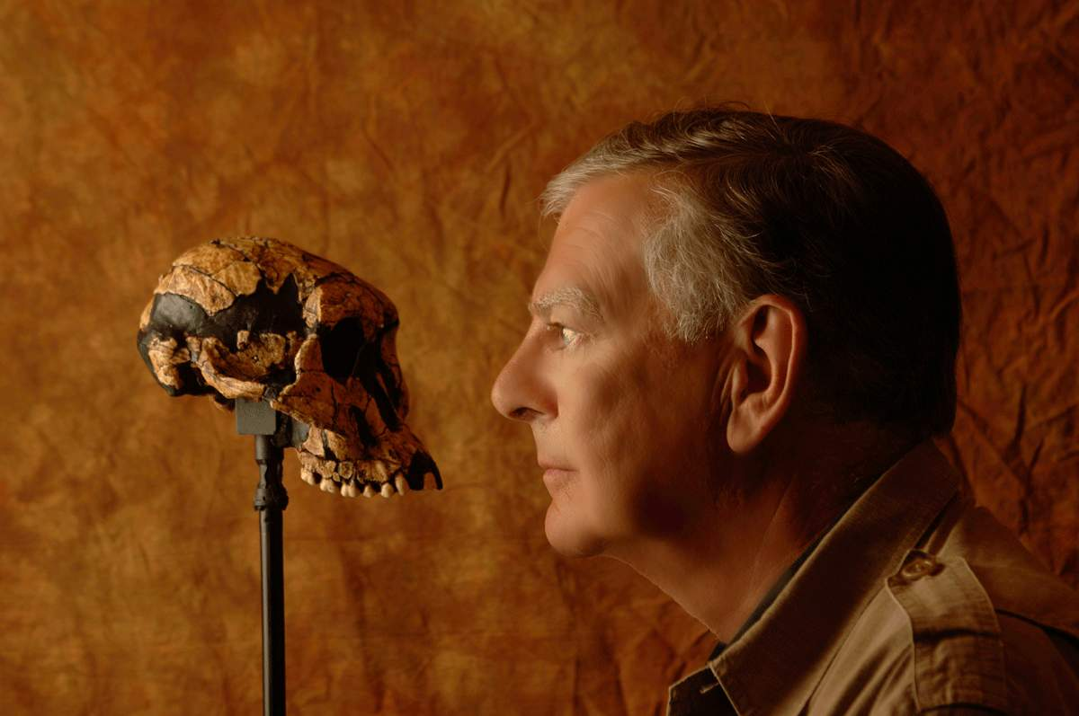 Американский палеоантрополог Дональд Джохансон, 2009 год.